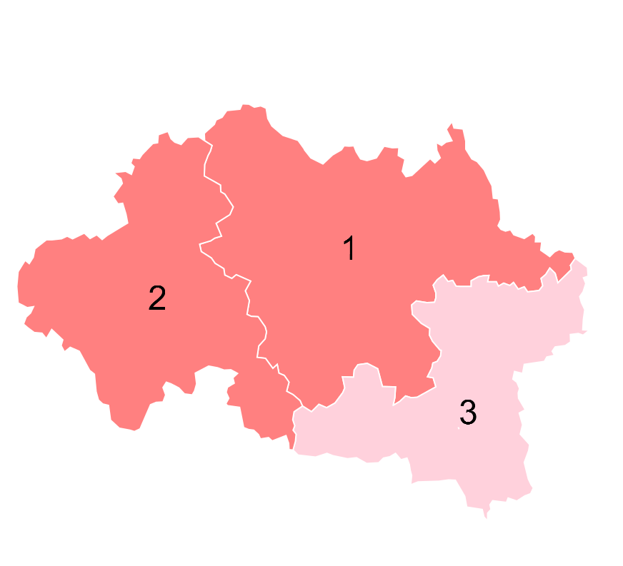 Résultats des élections législatives de l'Allier en 2012